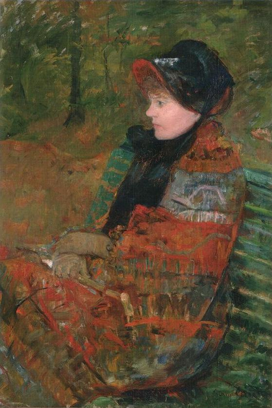 Cuadro de la pintora norteamericana Mary Cassatt